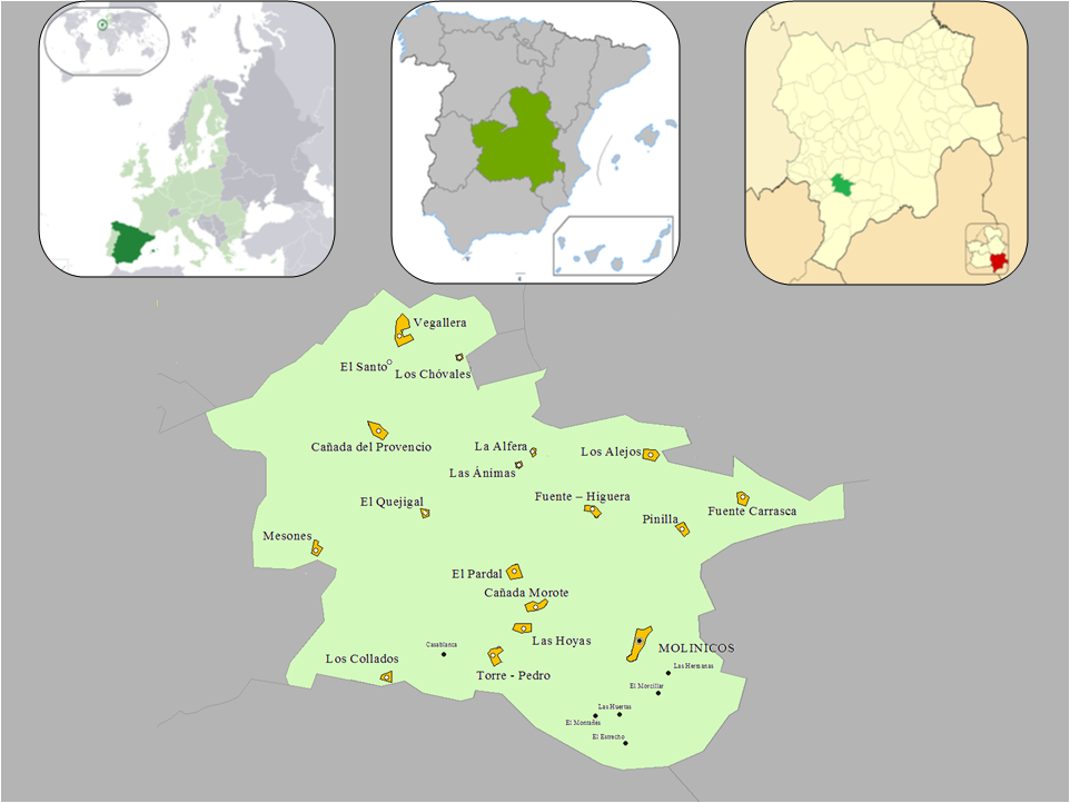 Mapa de localización del municipio de Molinicos respecto a Europa, España, Castilla - La Mancha y la provincia de Albacete. Contiene todas las localidades que integran el término municipal.